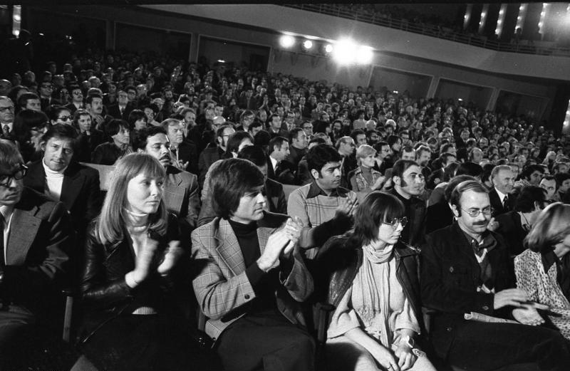 ADN-ZB/Gahlbeck/22.11.76/Leipzig: XIX. Internationale Dokumentar- und Kurzfilmwoche in Leipzig/ Filme aus 51 Ländern, der PLO, des Komitees Antifaschistisches Chile, aus Westberlin, der UNO und der UNESCO werden während der XIX. Internationale Dokumentar- und Kurzfilmwoche (20.-27.11.76) in Leipzig gezeigt. Unter den Zuschauern im Festivalkino "Capitol" war der Sänger Dean Reed (2.v.l.).